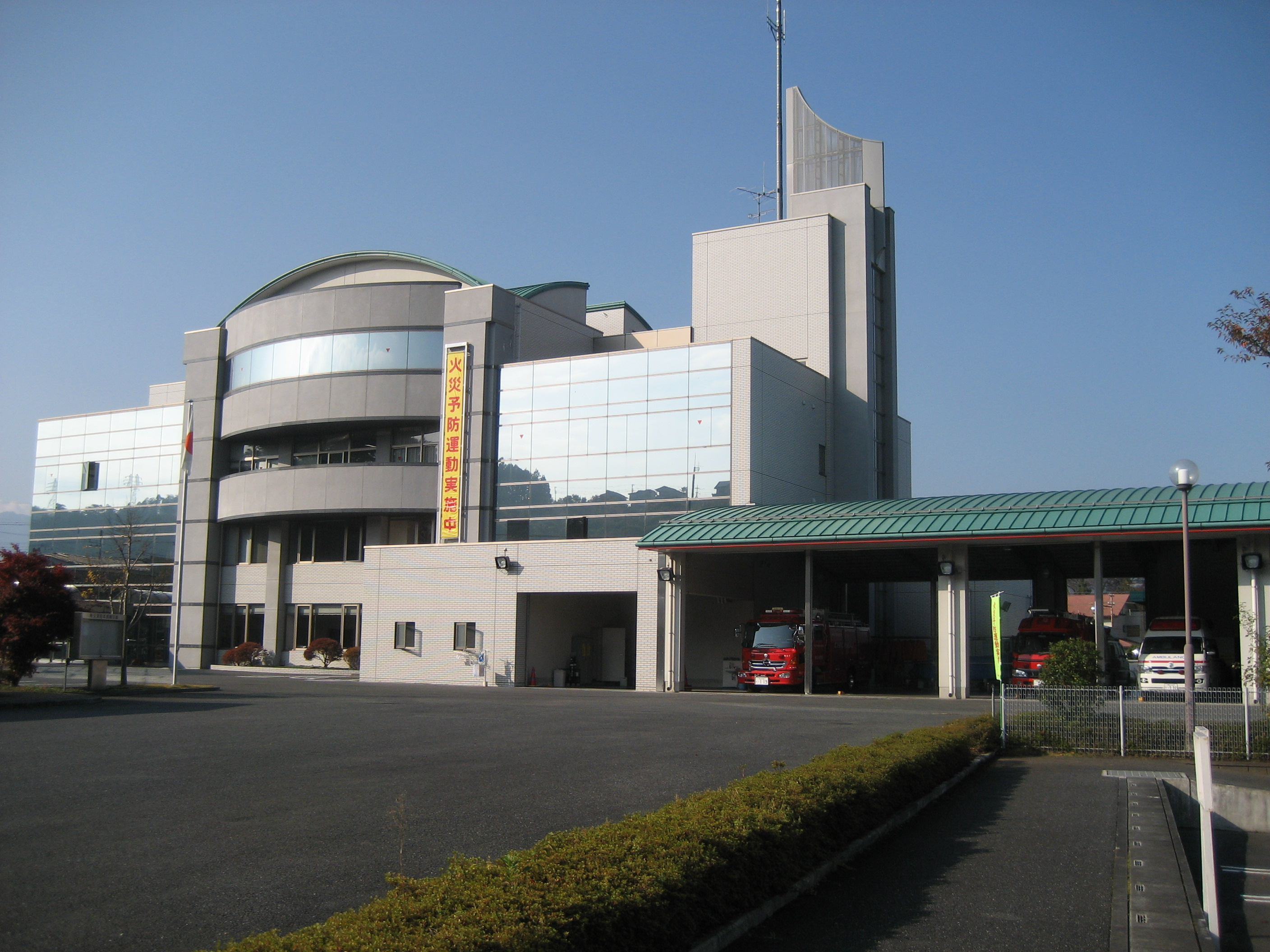 秩父消防本部消防署庁舎